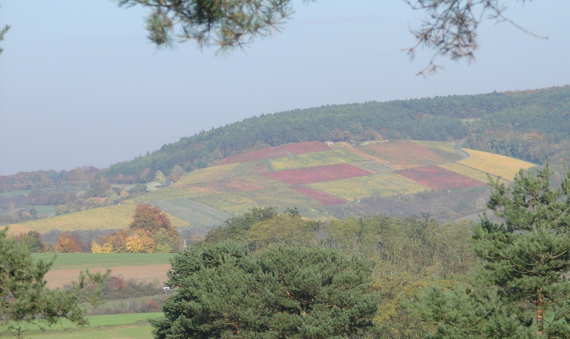 Weinberg Eußenheimer First im Oktober